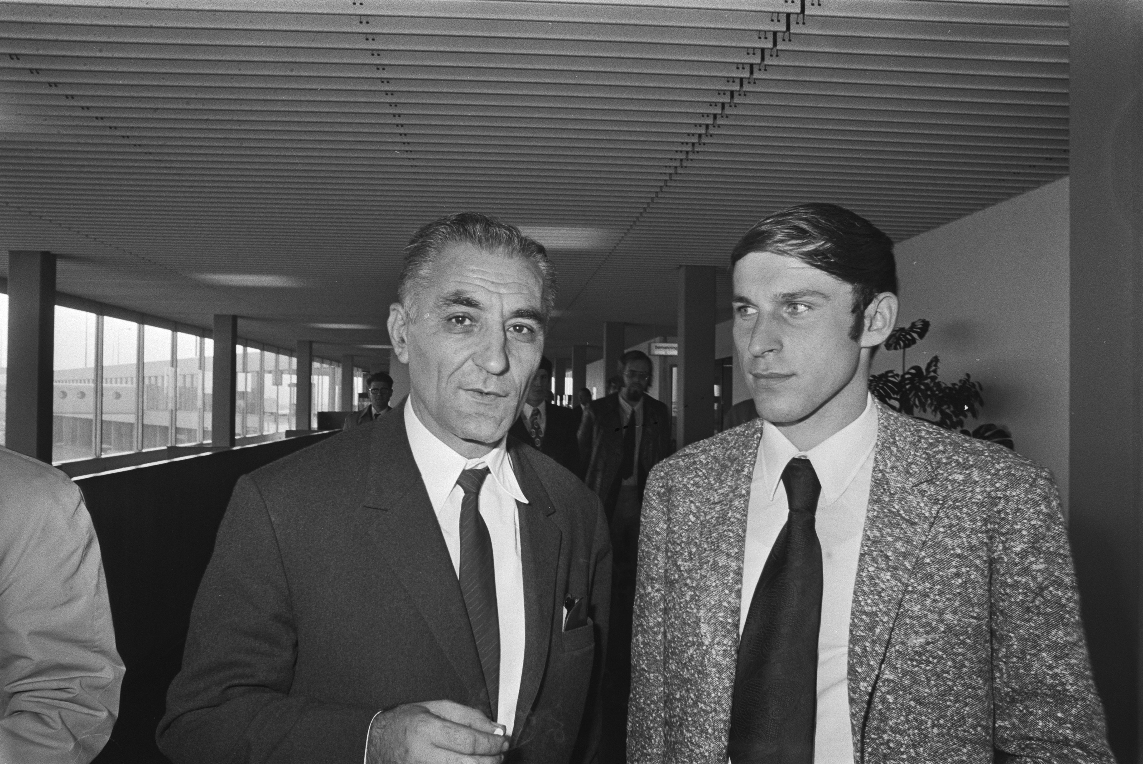 Collectie / Archief : Fotocollectie Anefo Reportage / Serie : [ onbekend ] Beschrijving : Joegoslavisch elftal arriveert op Schiphol; nr. 20a: link R. Mitic , rechts Djajic, kop, nr. 21a: spelers op roltrap links voor Djajic Datum : 8 oktober 1970 Trefwoorden : elftallen, sport, voetbal Persoonsnaam : R. Mitic Instellingsnaam : Schiphol Fotograaf : Mieremet, Rob / Anefo Auteursrechthebbende : Nationaal Archief Materiaalsoort : Negatief (zwart/wit) Nummer archiefinventaris : bekijk toegang 2.24.01.05 Bestanddeelnummer : 923-9076